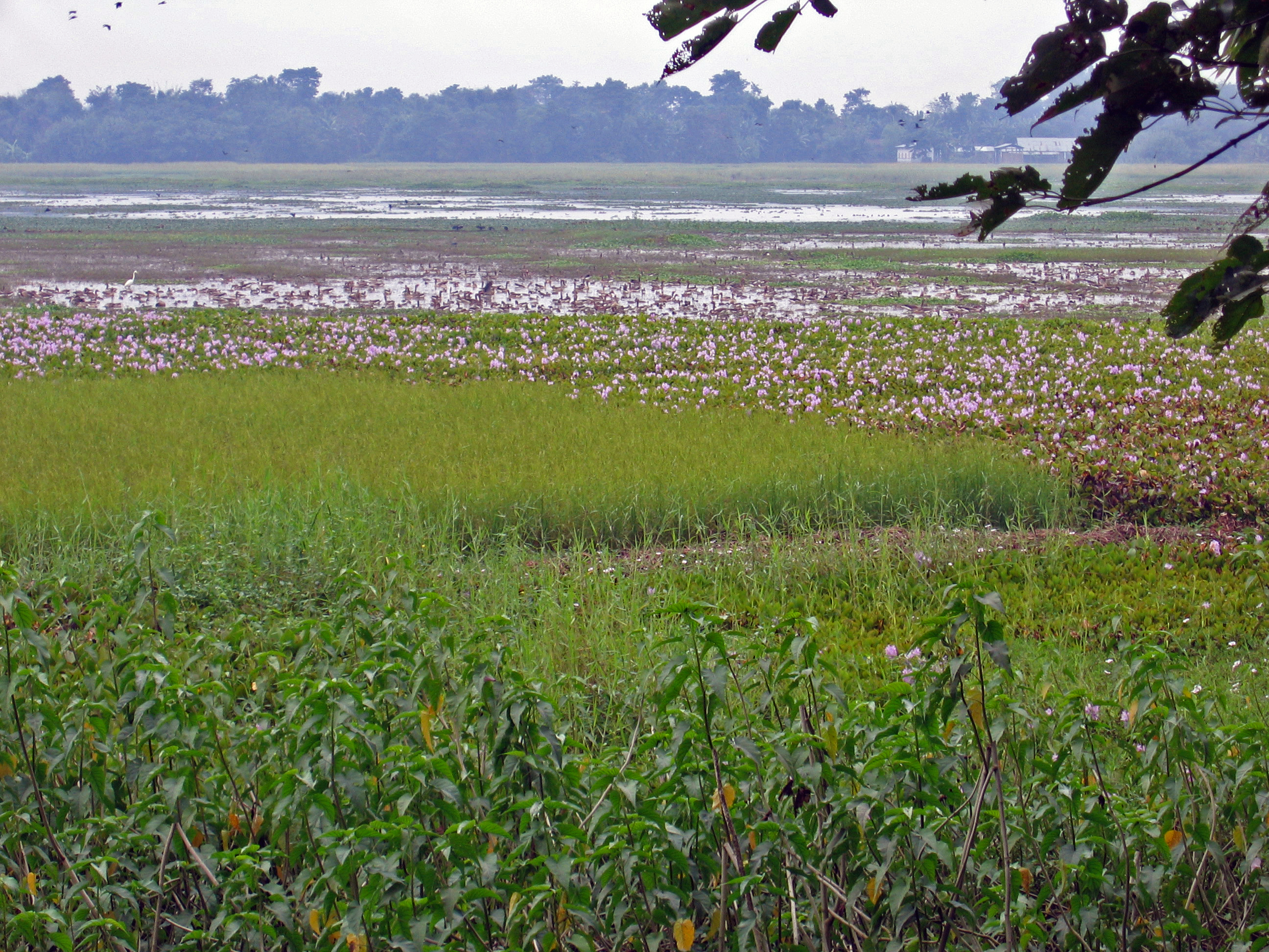 Majuli nature